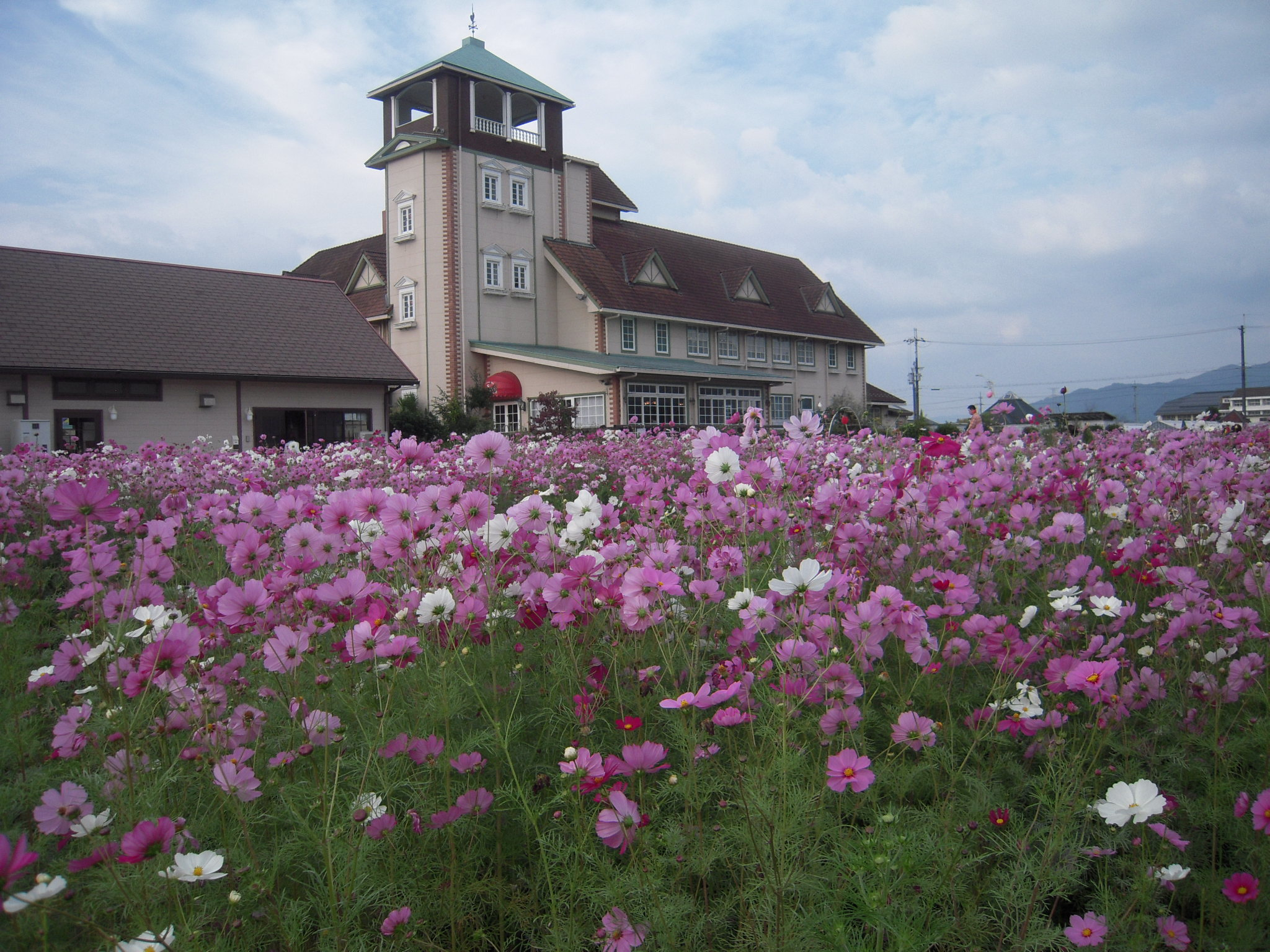 あいとうマーガレットステーションのコスモス畑